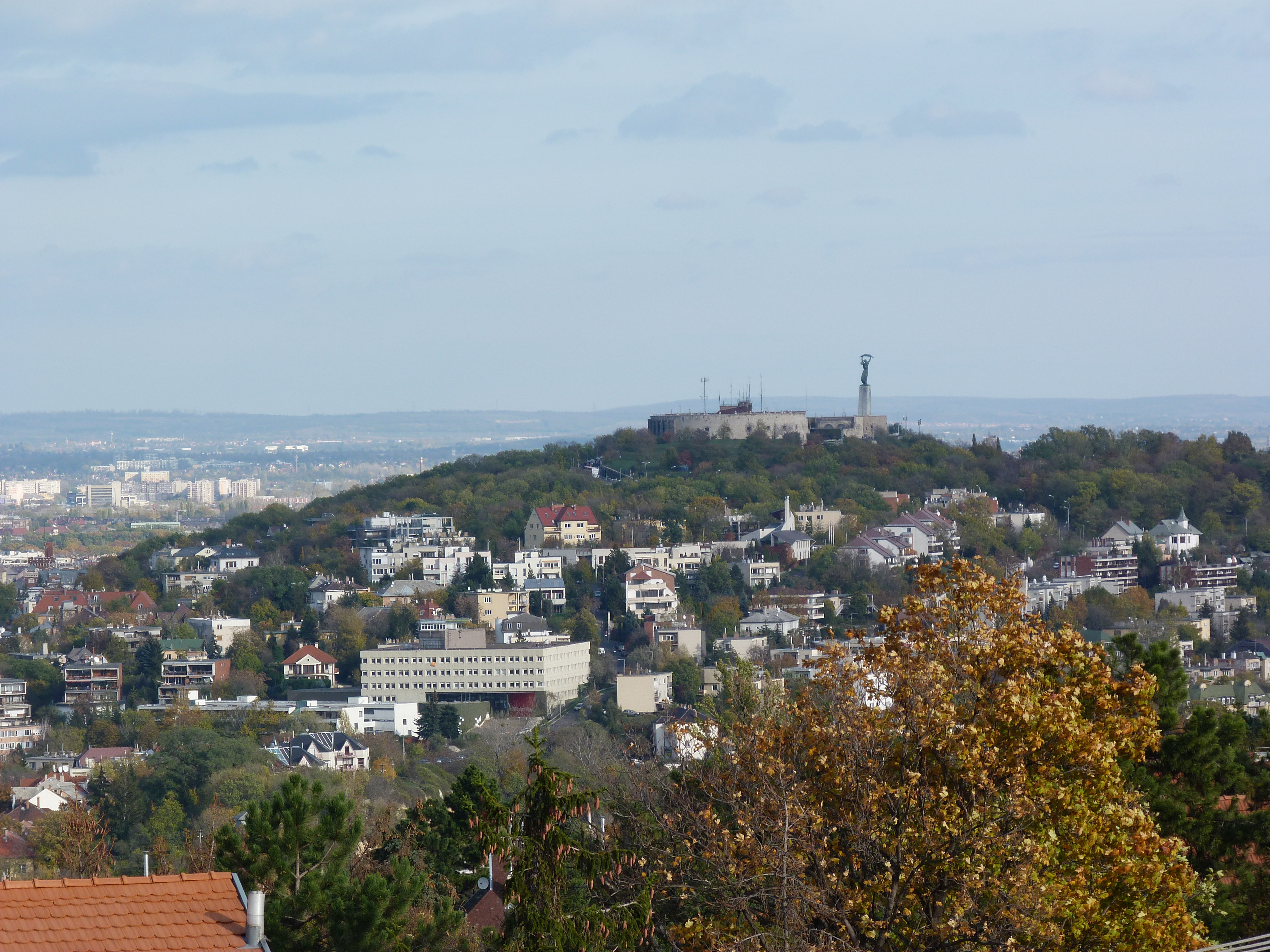 A felvétel 2012. november 4 -én készült Budapesten, a Sashegy 3. számú magaslati pontjáról. Gellérthegy.